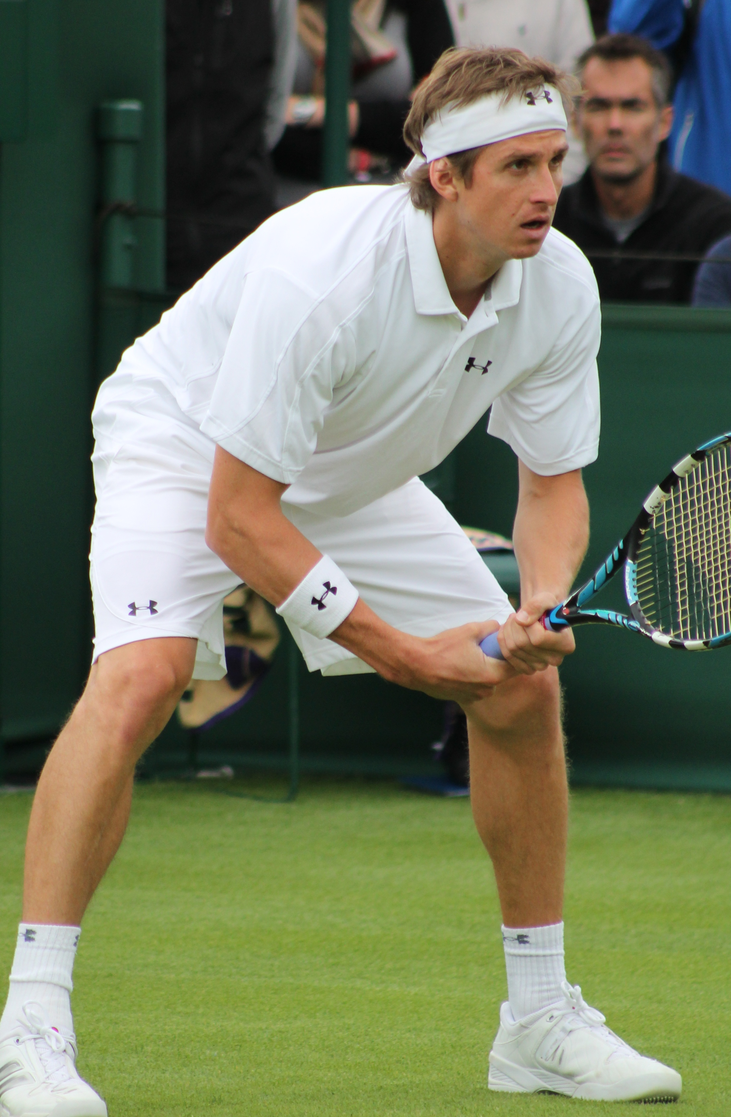 Andreev WM13-003